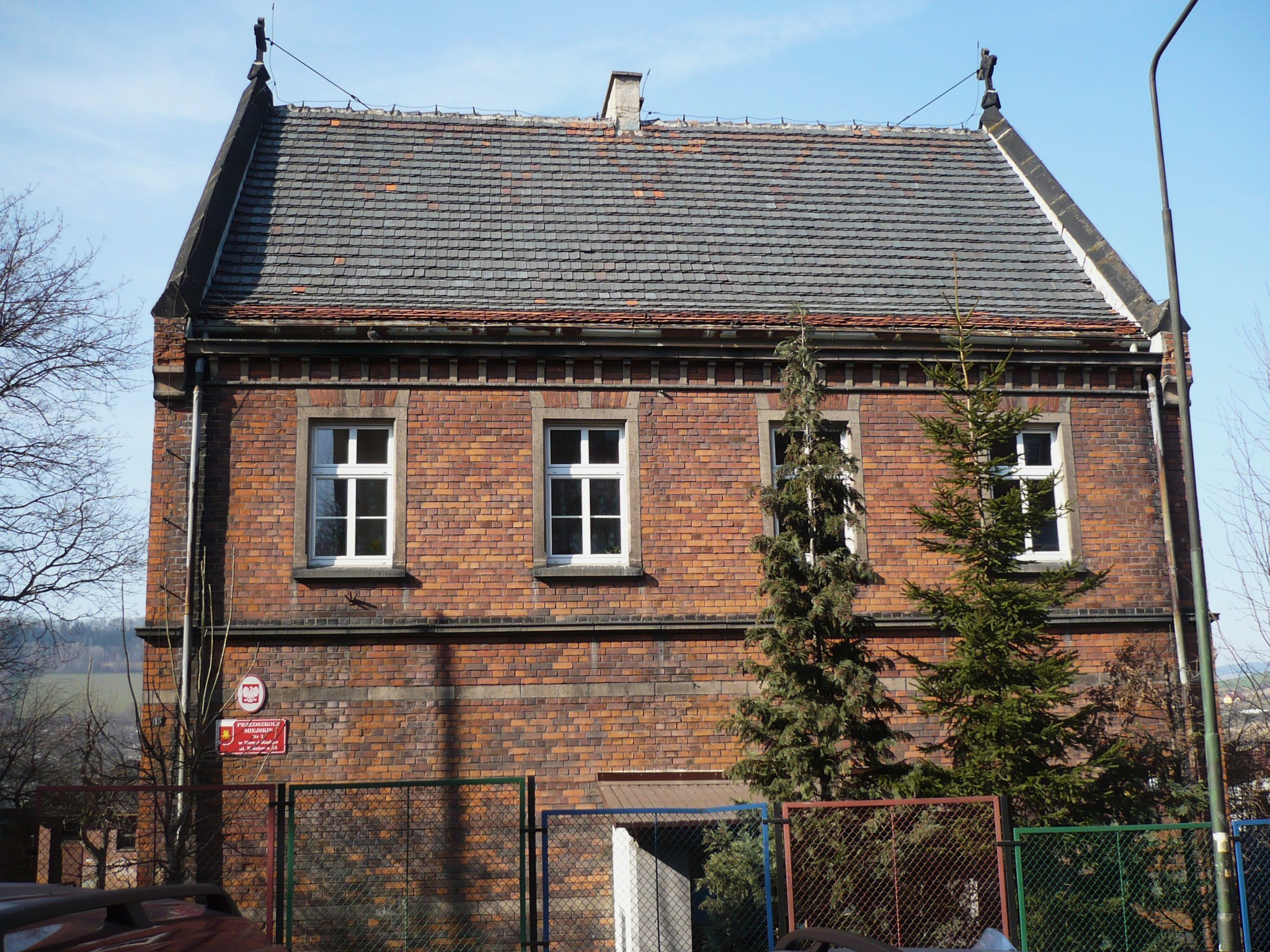 Nowa Ruda, ul. Kolejowa 15 - Nowa szkoła ewangelicka, obecnie Przedszkole Miejskie nr 1 "Plastuś", 1896